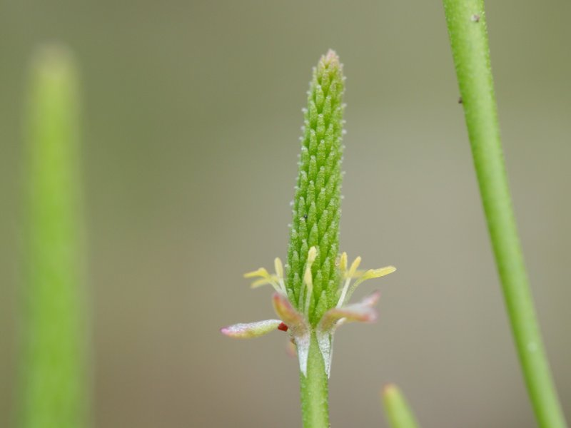 Mäuseschwänzchen (Myosurus minimus)